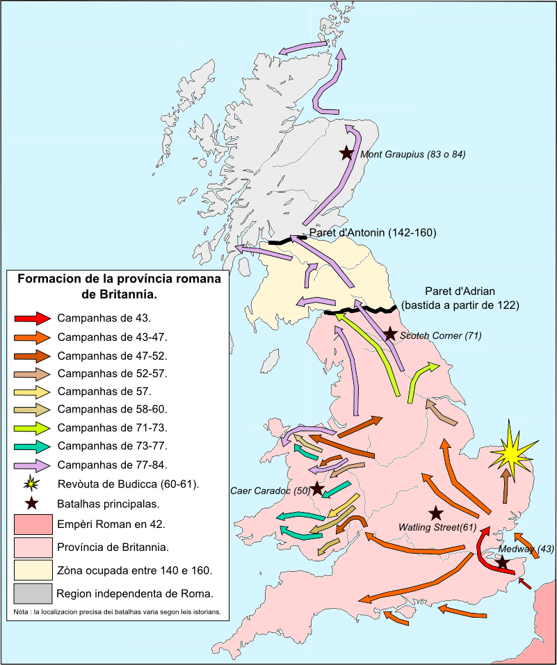 Conquista romana deis illas britanicas e formacion de la província de Britannia.